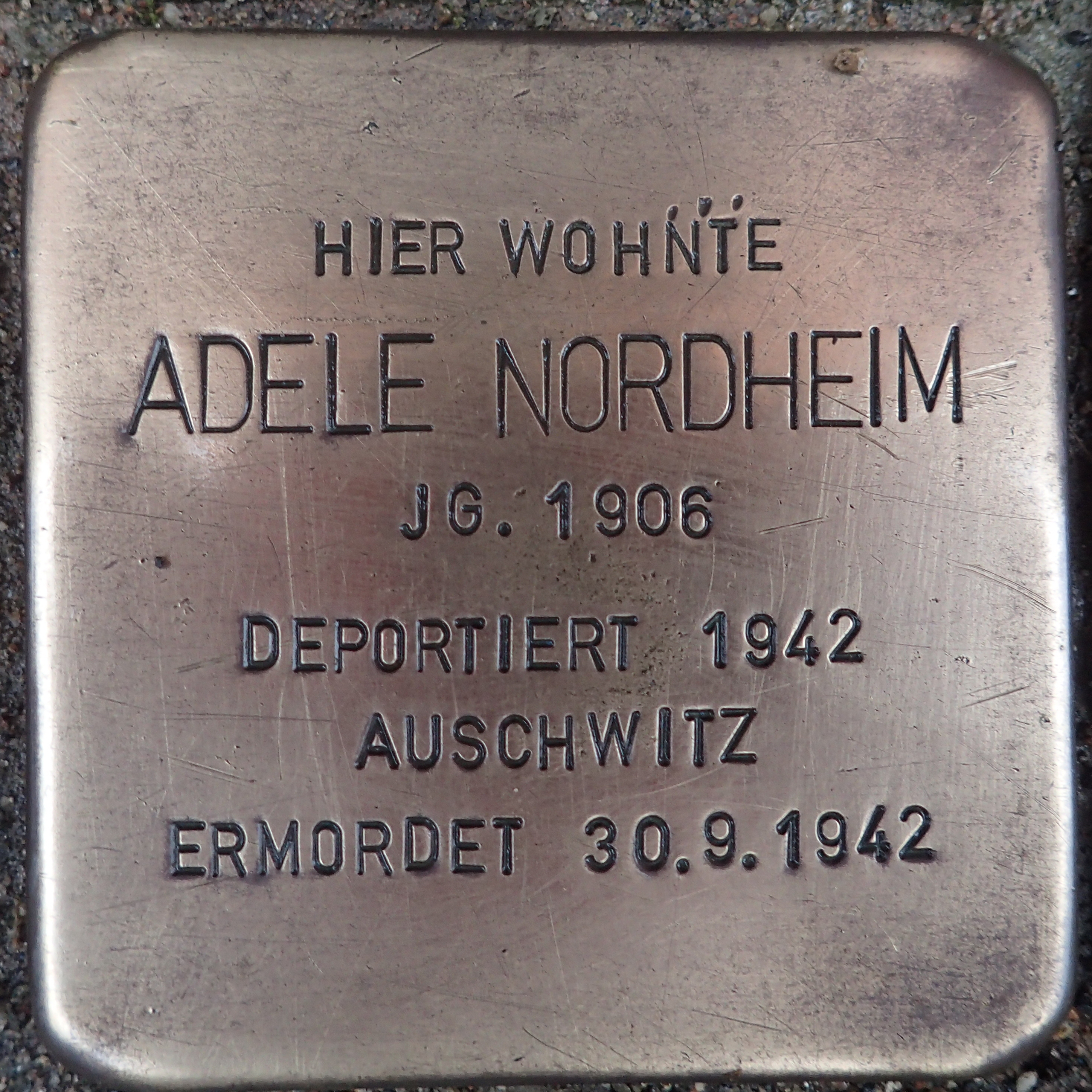 Stolperstein Geldern Westwall 6 Adele Nordheim